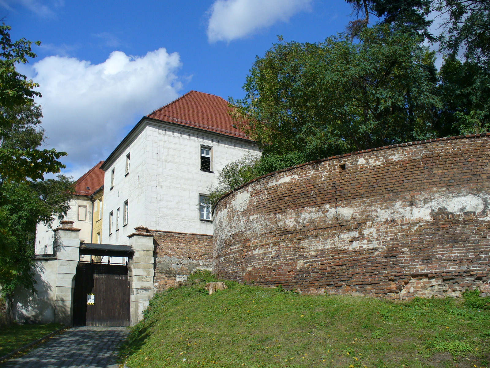 Proskau. Schloss und Stadtmauer - Prószków. Zamek i resztki murów miejskich. City walls and castle in Prószków / Proskau (Silesia)